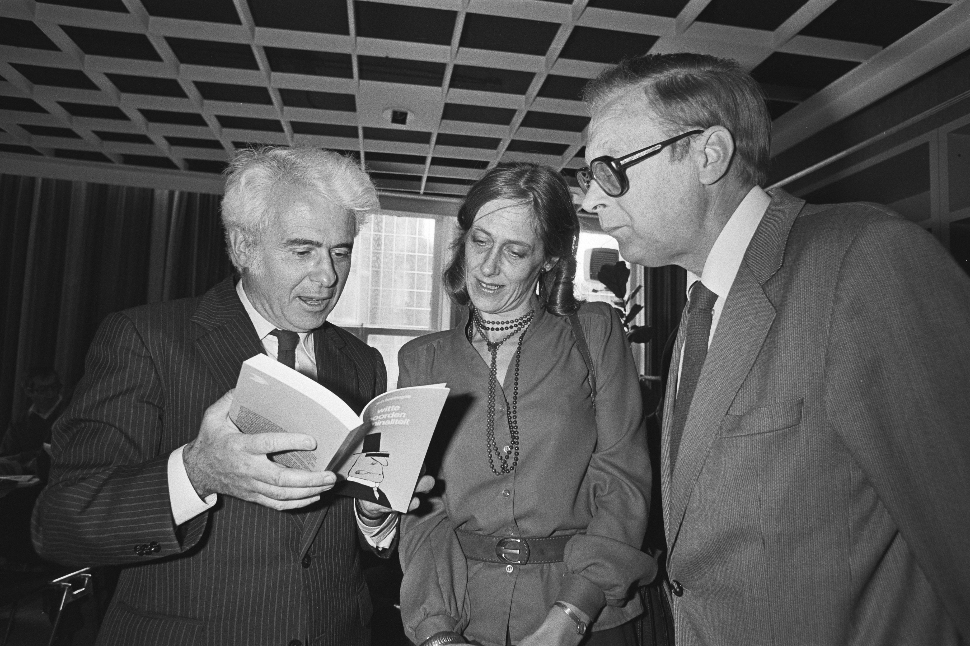 Collectie / Archief : Fotocollectie Anefo Reportage / Serie : Presentatie van het boek "Witte boorden-criminaliteit" van de Rotterdamse criminoloog professor G.P. Hoefnagels Beschrijving : Van links naar rechts Professor G.P. [Peter] Hoefnagels, staatssecretaris Ineke Lambers-Hacquebard (D66) en kamerlid Hein Roethof (PvdA) Datum : 30 september 1981 Locatie : Rotterdam, Zuid-Holland Trefwoorden : boeken, parlementariërs, presentaties, staatssecretarissen Persoonsnaam : Hoefnagels, G.P., Lambers-Hacquebard, J.J., Roethof, Hein Fotograaf : [onbekend] Auteursrechthebbende : Nationaal Archief Materiaalsoort : Negatief (zwart/wit) Nummer archiefinventaris : bekijk toegang 2.24.01.05 Bestanddeelnummer : 931-7132